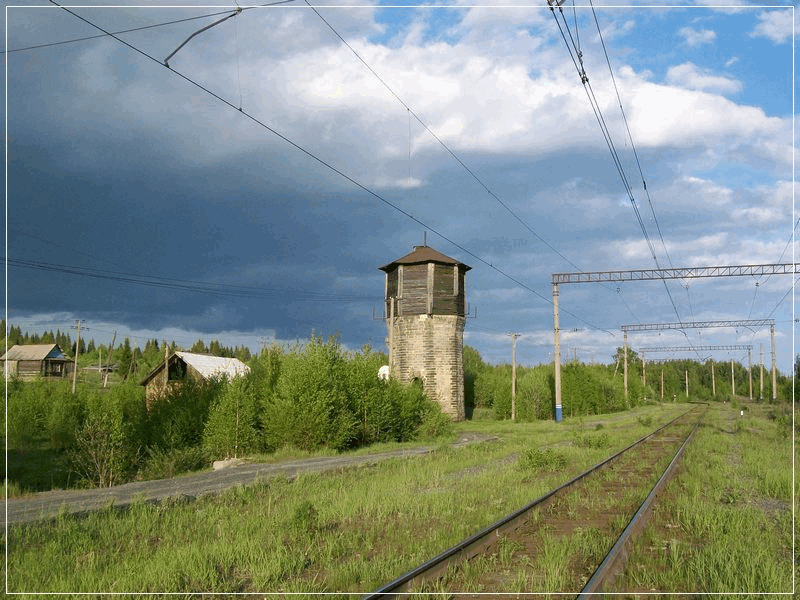 Старая водонапорная башня на станции Хребет-Уральский